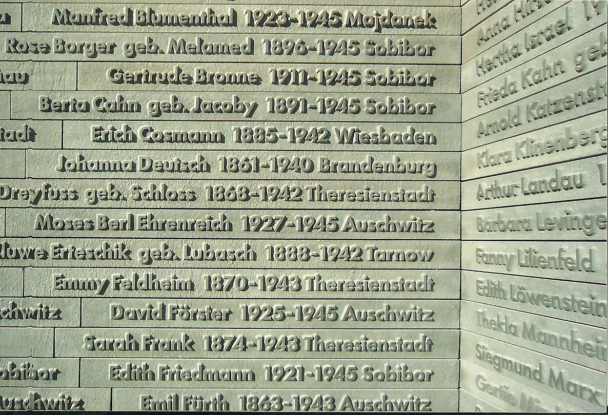 שמות הנספים על קיר הזכרון